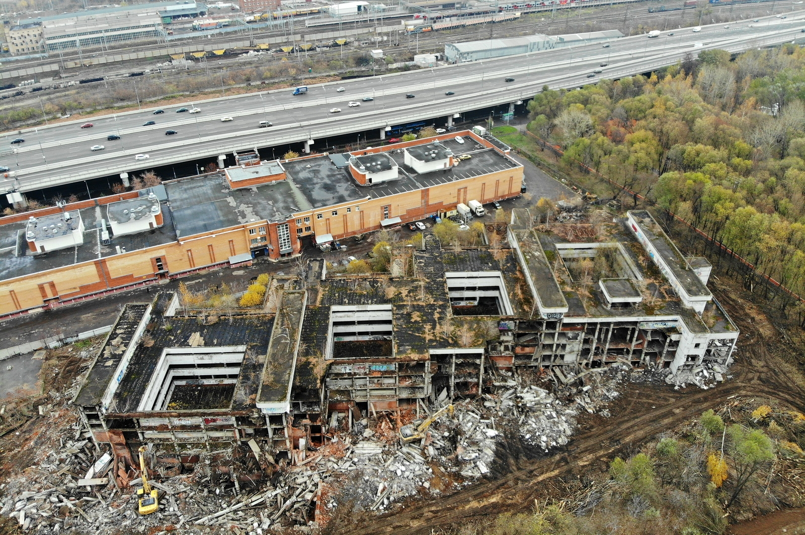 Снос Ховринской больницы